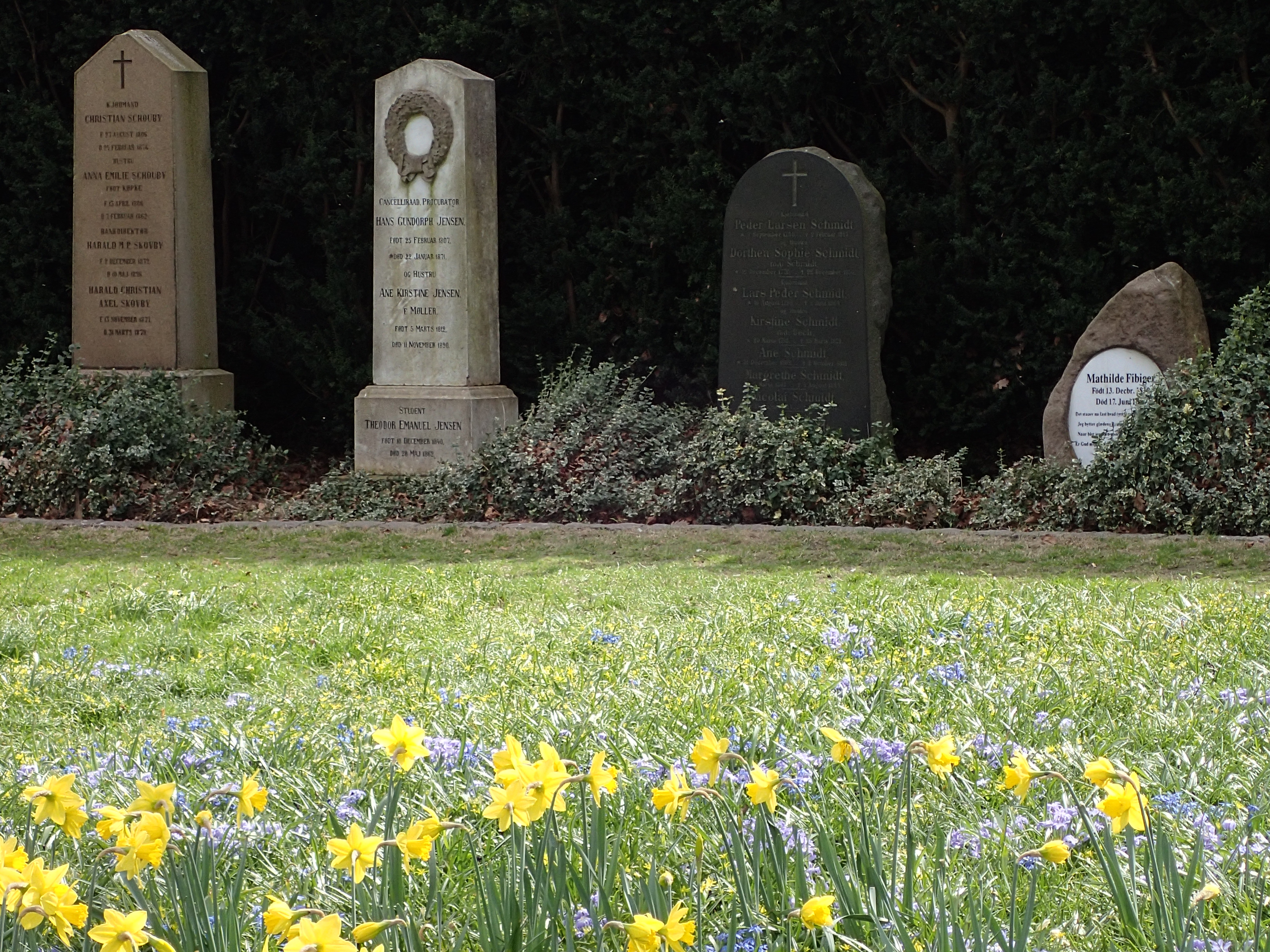 Søndre Kirkegård